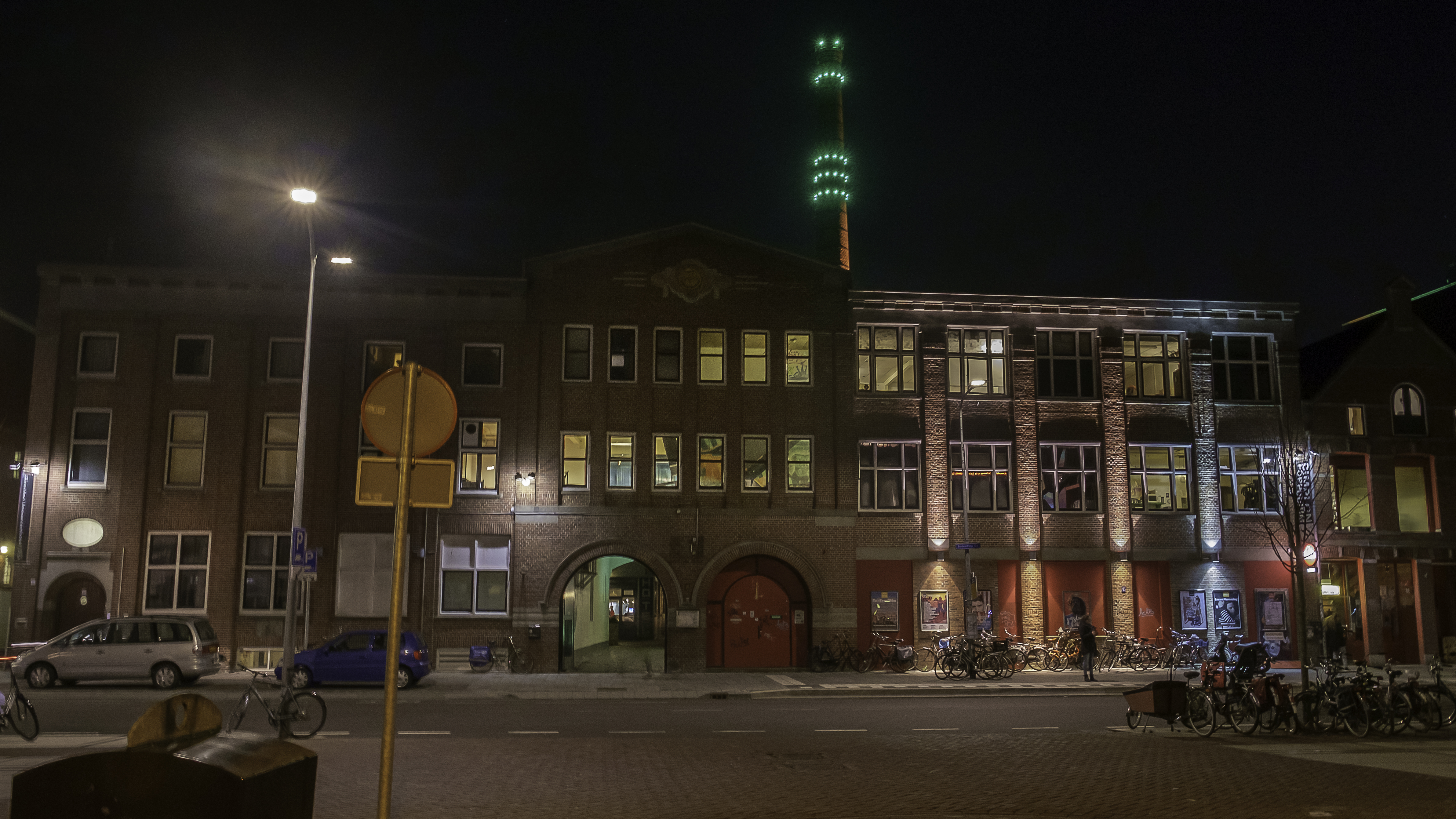 Simplon bij avond